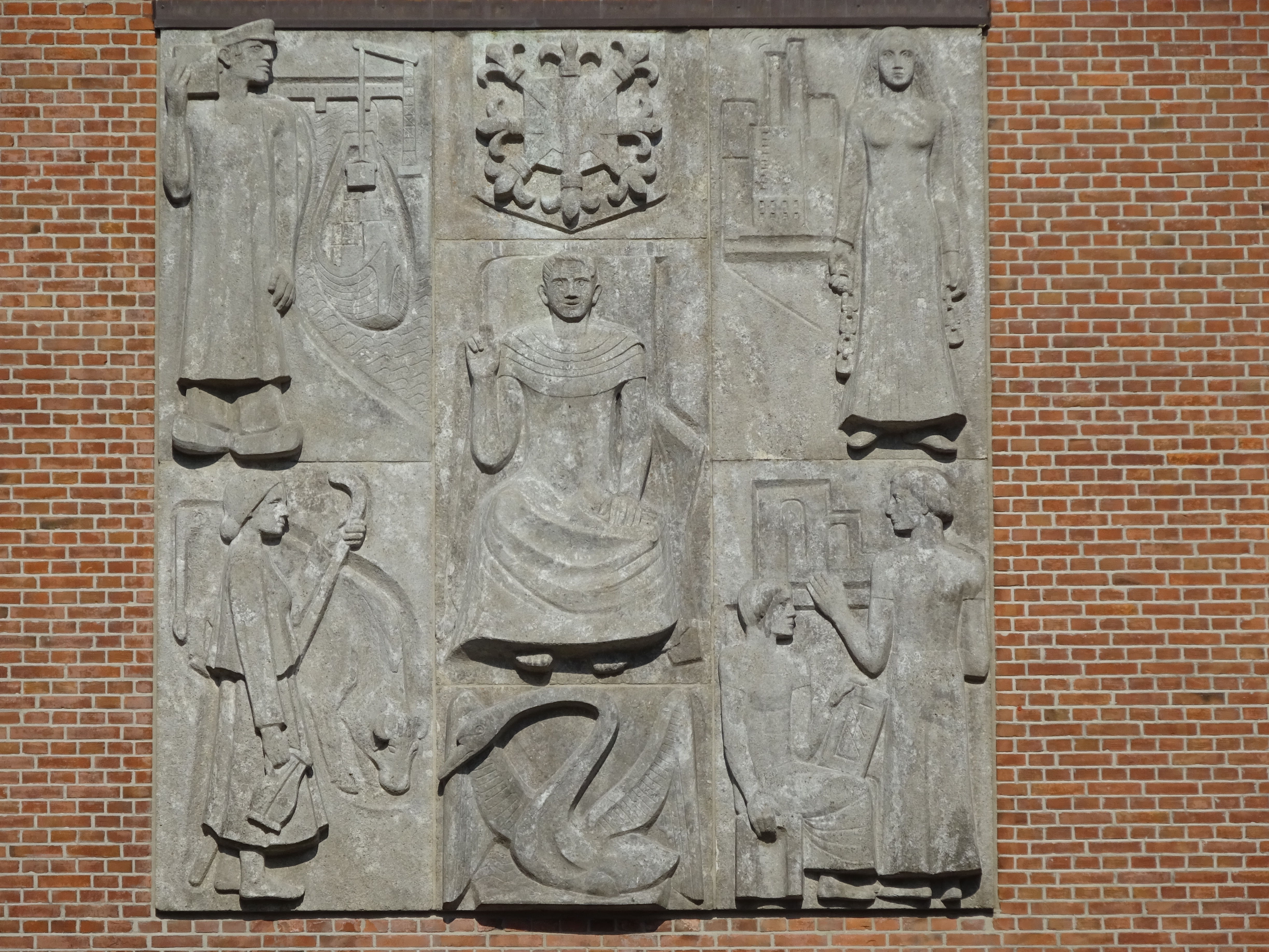 Relief van Alfred Sabisch (1905-1986) boven de hoofdingang van Kreisverwaltung Kleve, Nassauerallee 15-23